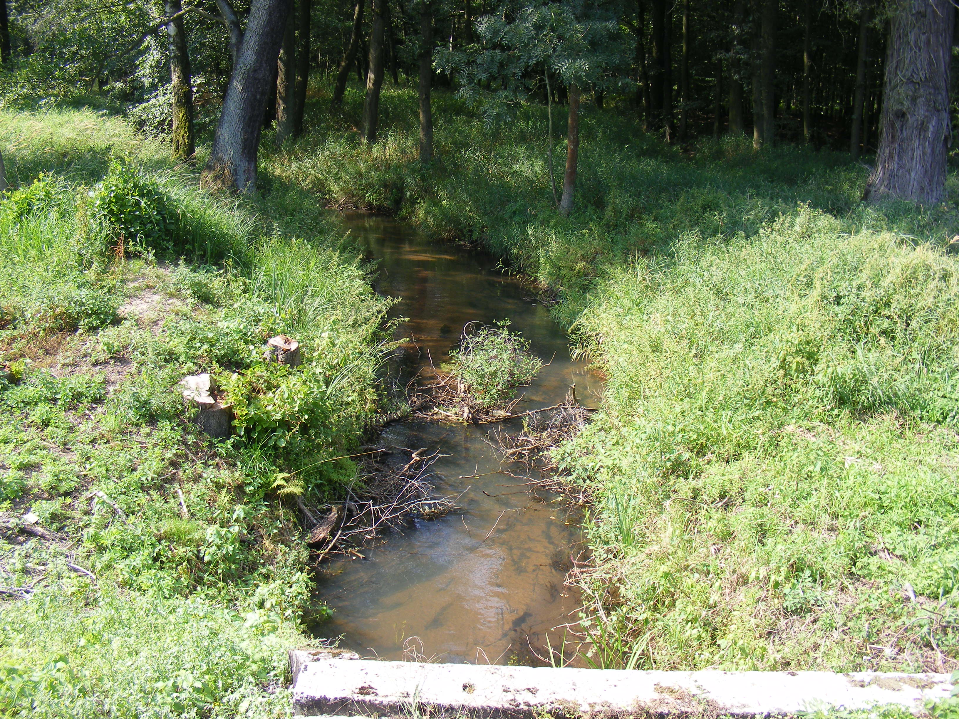 Rzeka Bogacica na wschód od miejscowości Nowa Bogacica